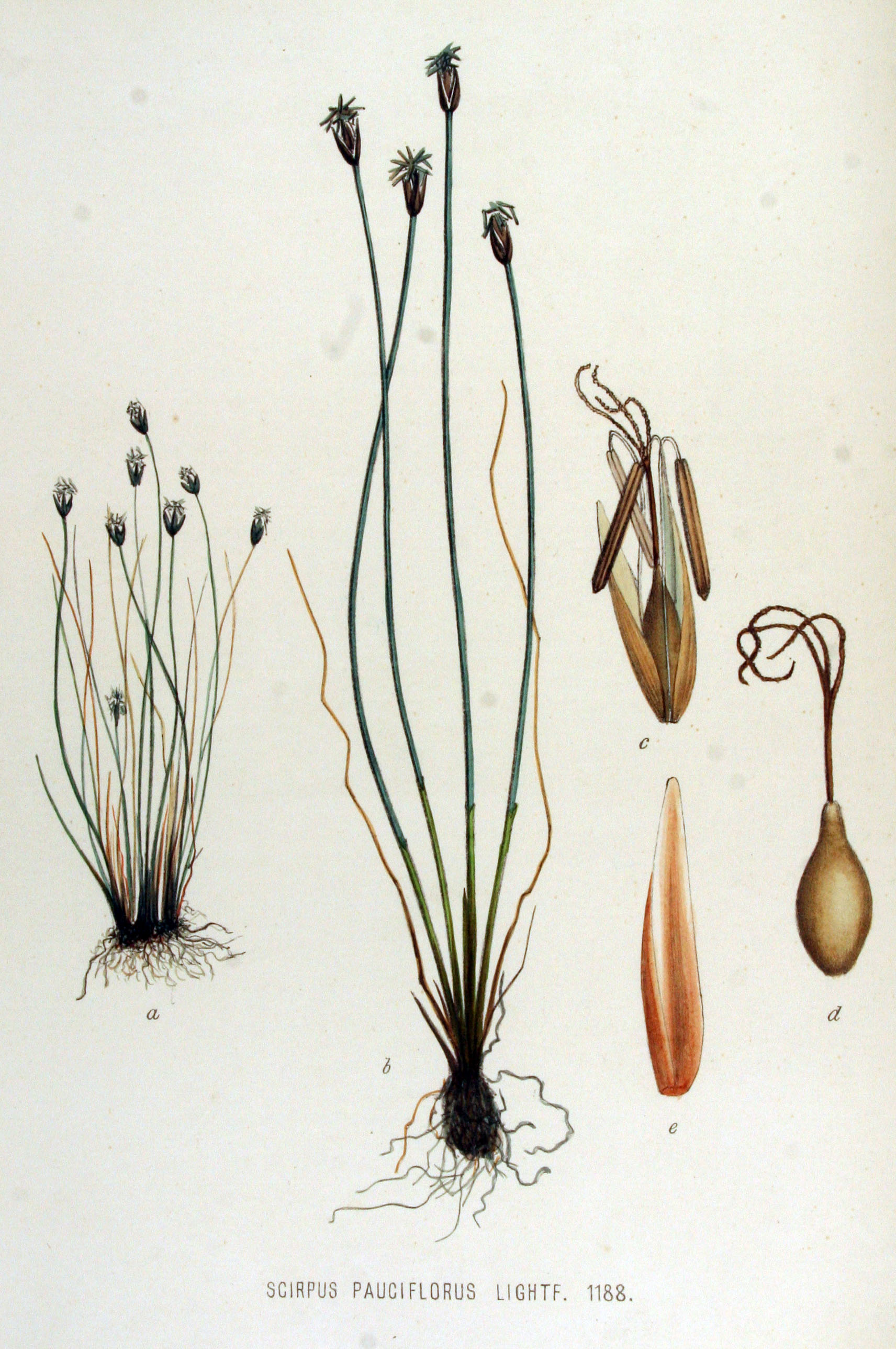 Eleocharis quinqueflora (F.X. Hartm.) O. Schwartz (Syn. Scirpus pauciflorus Lightf.)